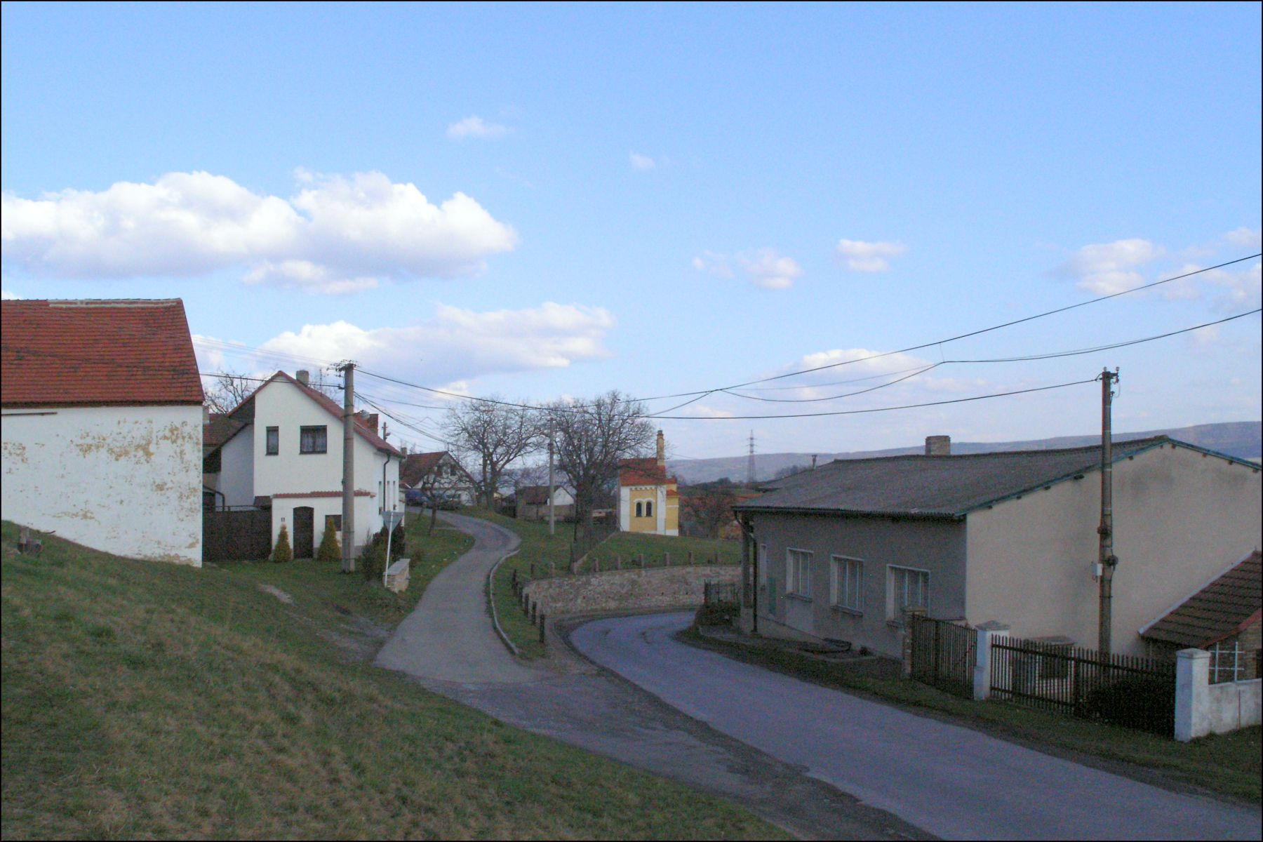 Korno (okres Beroun)